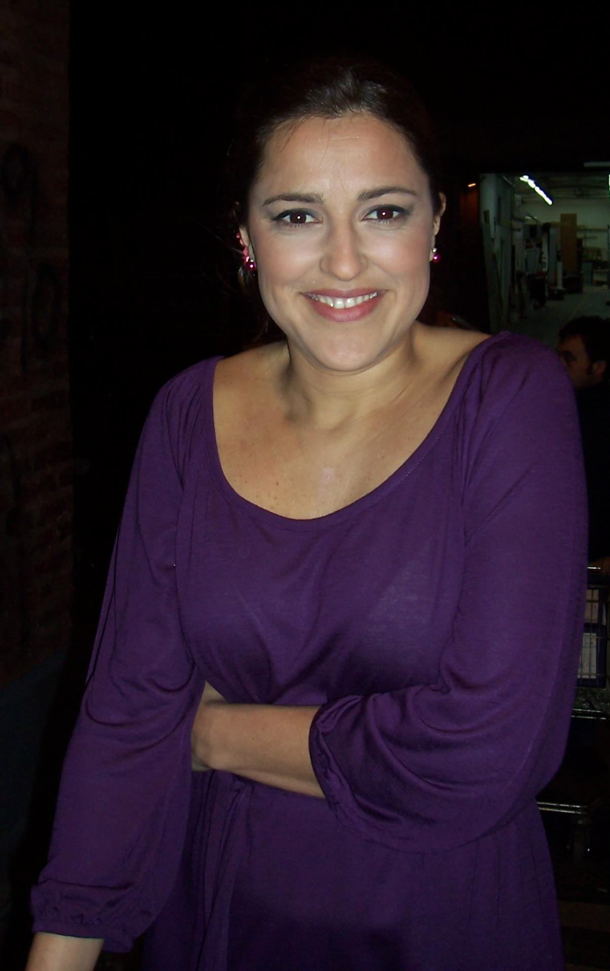 La actriz argentina Maju Lozano en RSM por América Televisión.